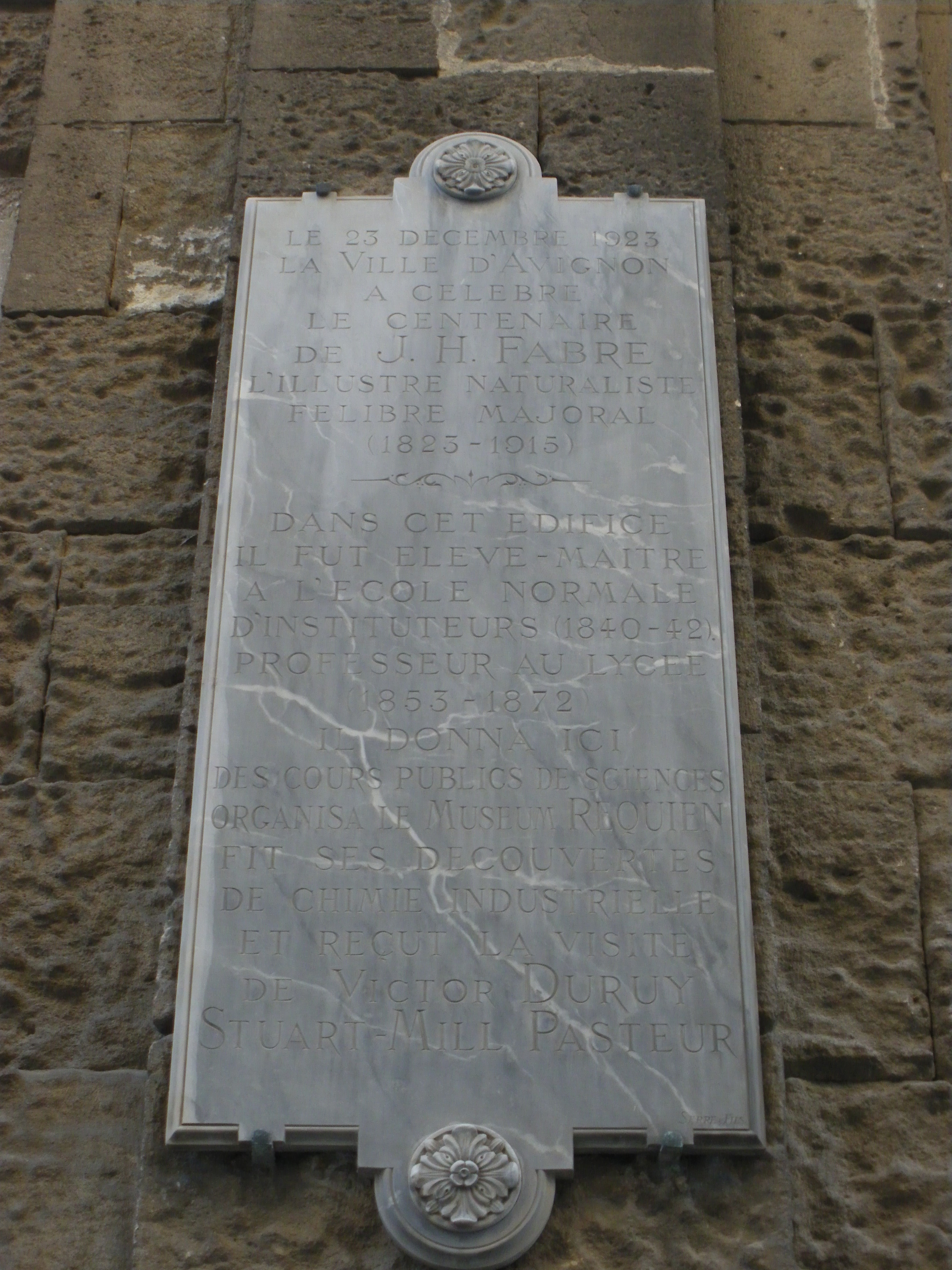 Plaque en hommage à Jean Fabre, temple Saint Martial, Avignon, France